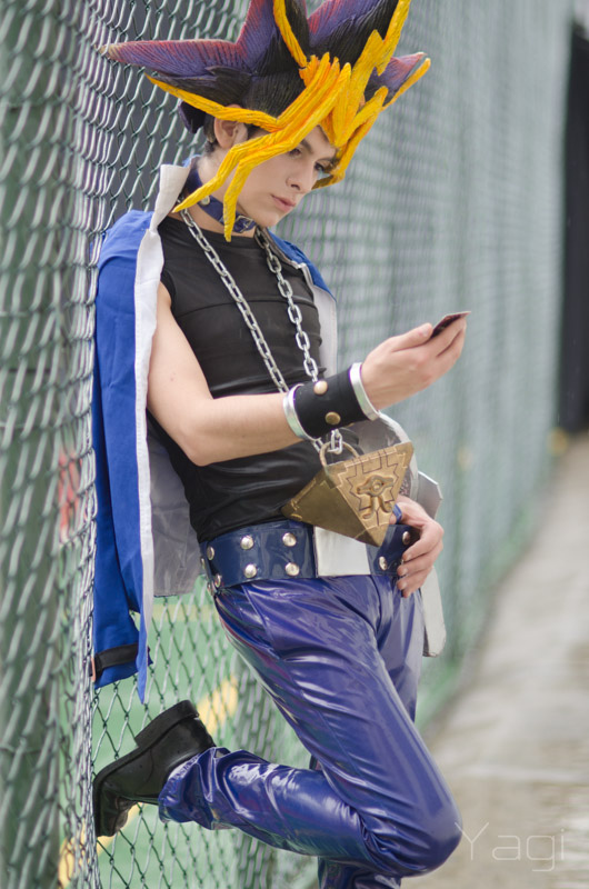 Foto tomada a un hombre representando a Yami Yugi en el Anime Fantasy - 2012.